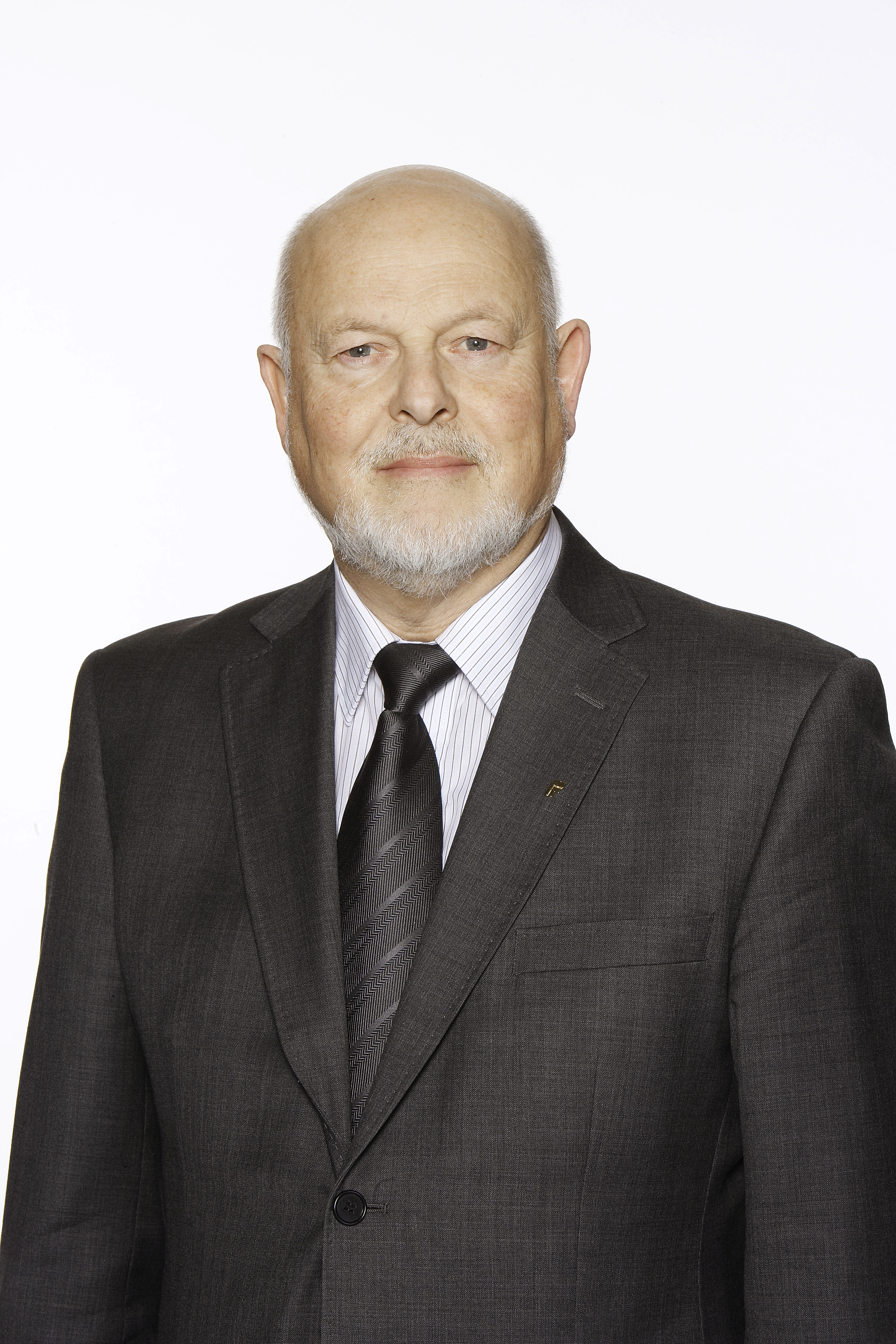 Åge Starheim, FrP-politikar